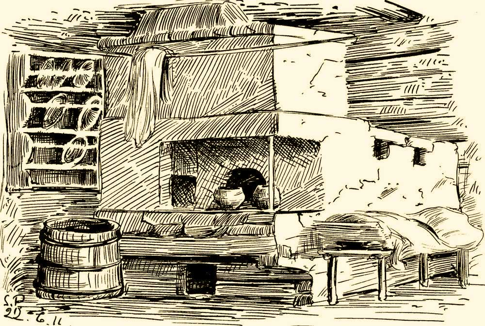 Рисунок. Интерьер ингерманландской избы прихода Ряяпювя (Рябово)